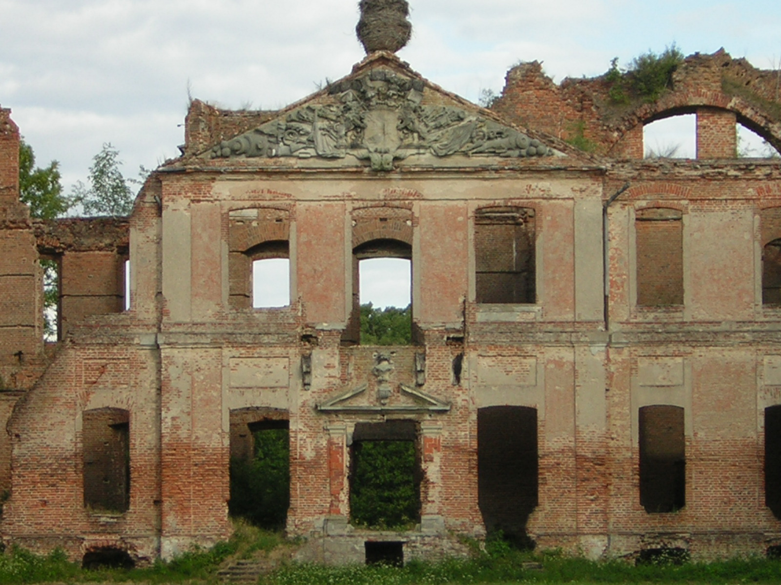 Pałac w Kamieńcu